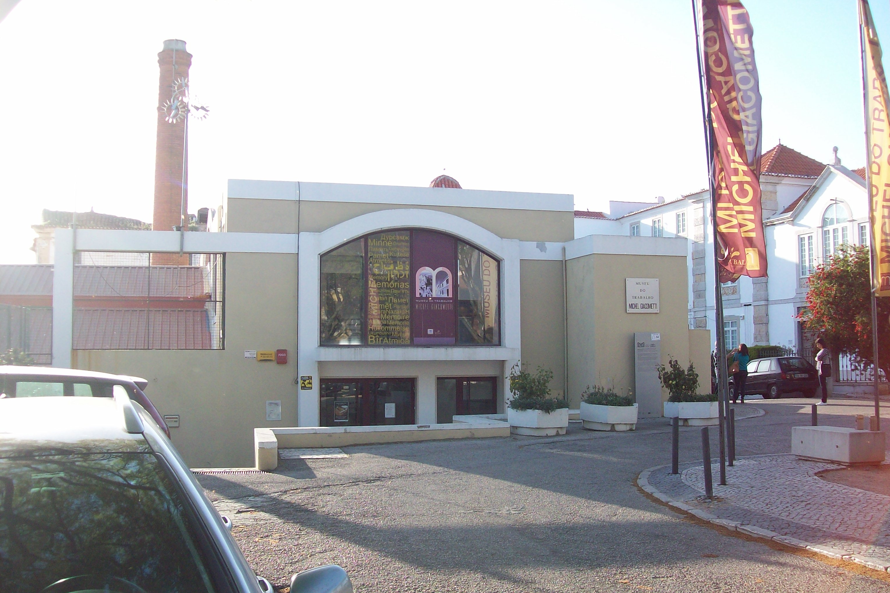 Museu do Trabalho Michel Giacometti - Vista exterior - Setúbal